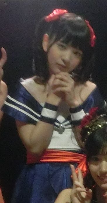 abemikako2018 DMM R-18 アダルトアワード2018（ディファ有明）